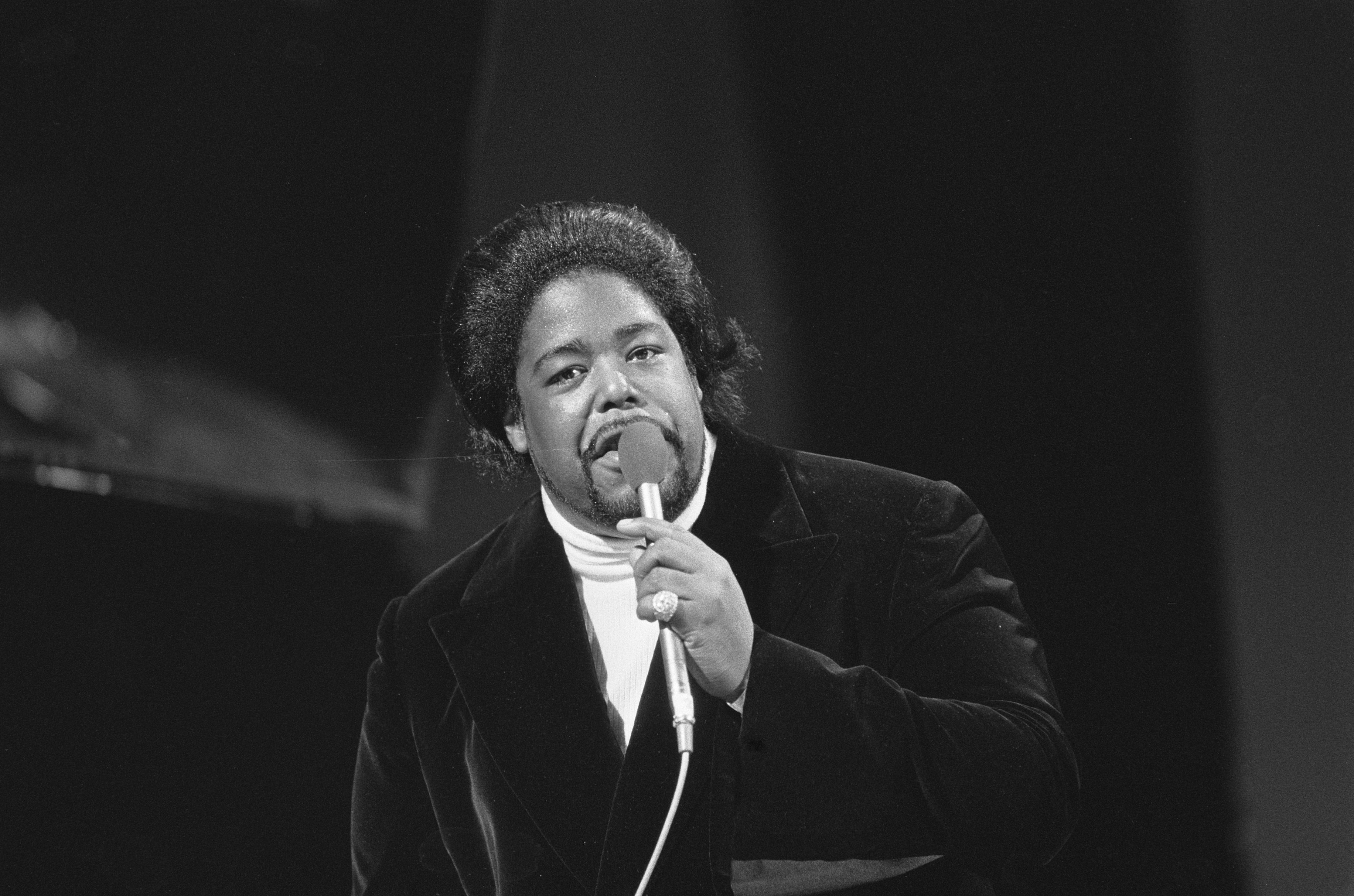 Collectie / Archief : Fotocollectie Anefo Reportage / Serie : Grand Gala du Disque in de RAI Beschrijving : Barry White Datum : 17 februari 1974 Locatie : Amsterdam, Noord-Holland Trefwoorden : festivals, zangers Persoonsnaam : White, Barry Instellingsnaam : RAI Fotograaf : Fotograaf Onbekend / Anefo Auteursrechthebbende : Nationaal Archief Materiaalsoort : Negatief (zwart/wit) Nummer archiefinventaris : bekijk toegang 2.24.01.05 Bestanddeelnummer : 927-0098